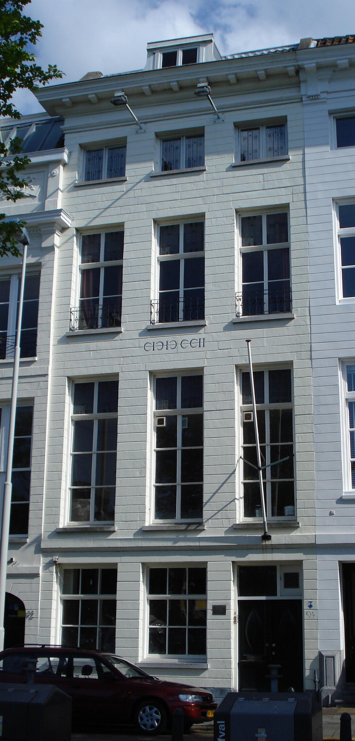 Rotterdam, Haringvliet 94. Rijksmonument.